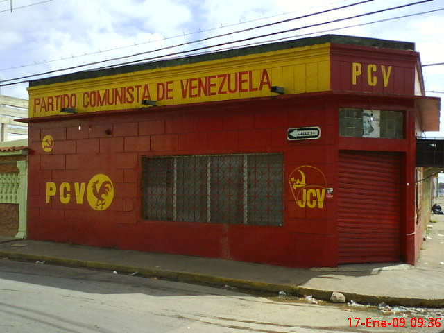 Sede de Monagas del Partido Comunista de Venezuela.